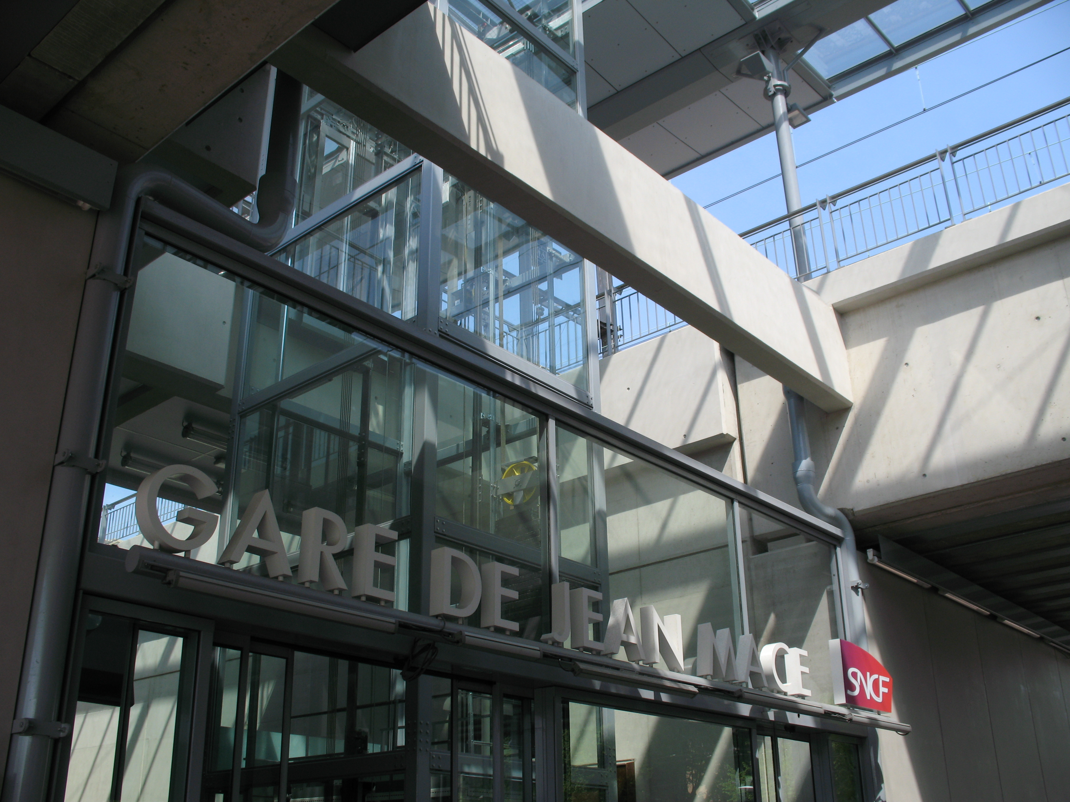 Entrée de la gare SNCF Lyon Jean Macé.